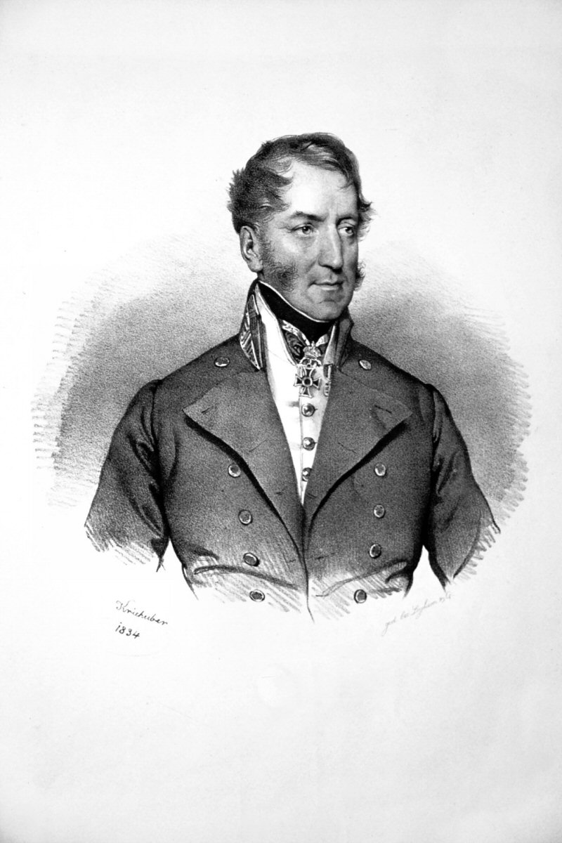 Johann Ernst Graf Hoyos-Sprinzenstein, Lithographie von Josef Kriehuber, 1834